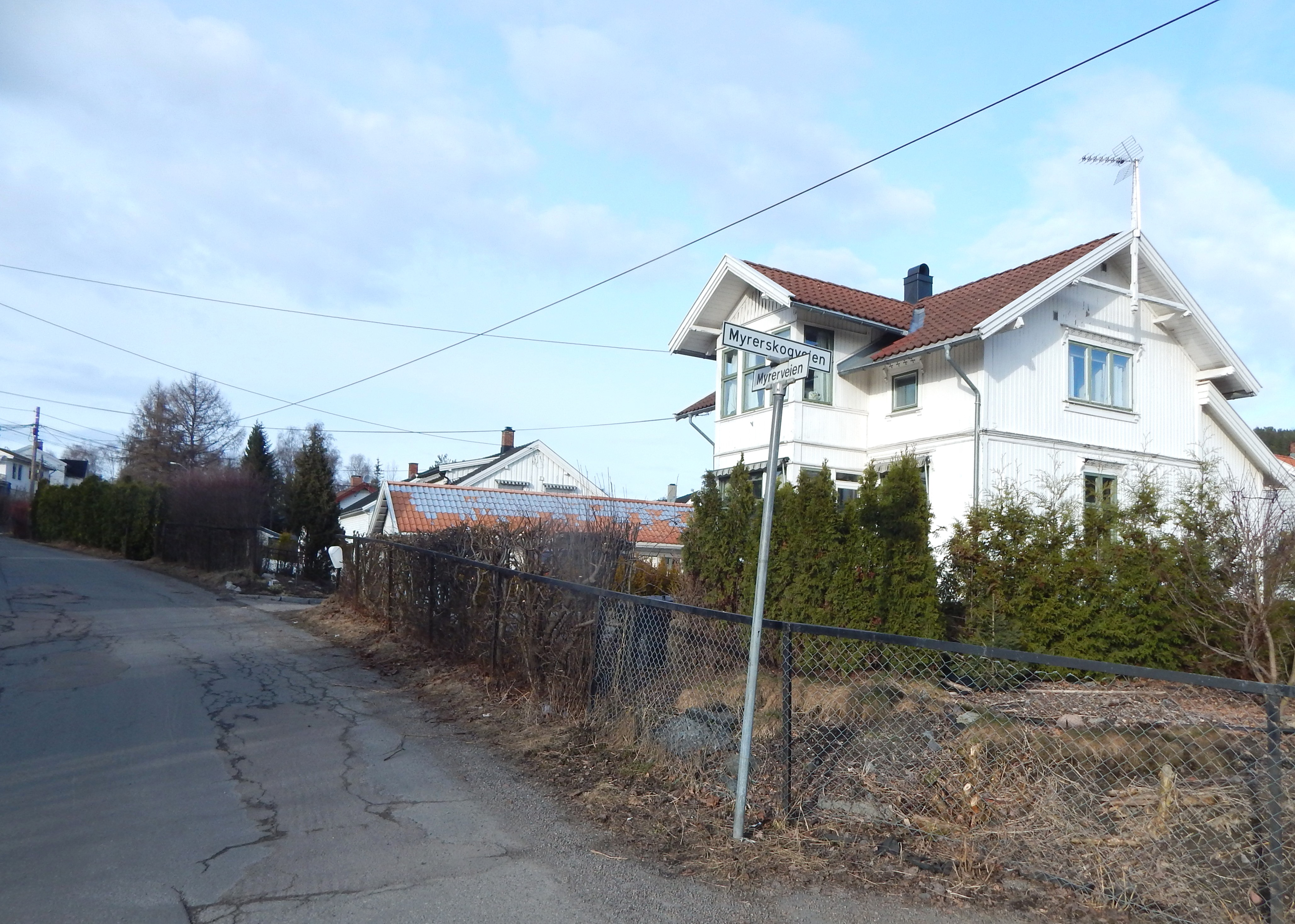 Sørenden av Myrerveien, i krysset med Myrerskogveien